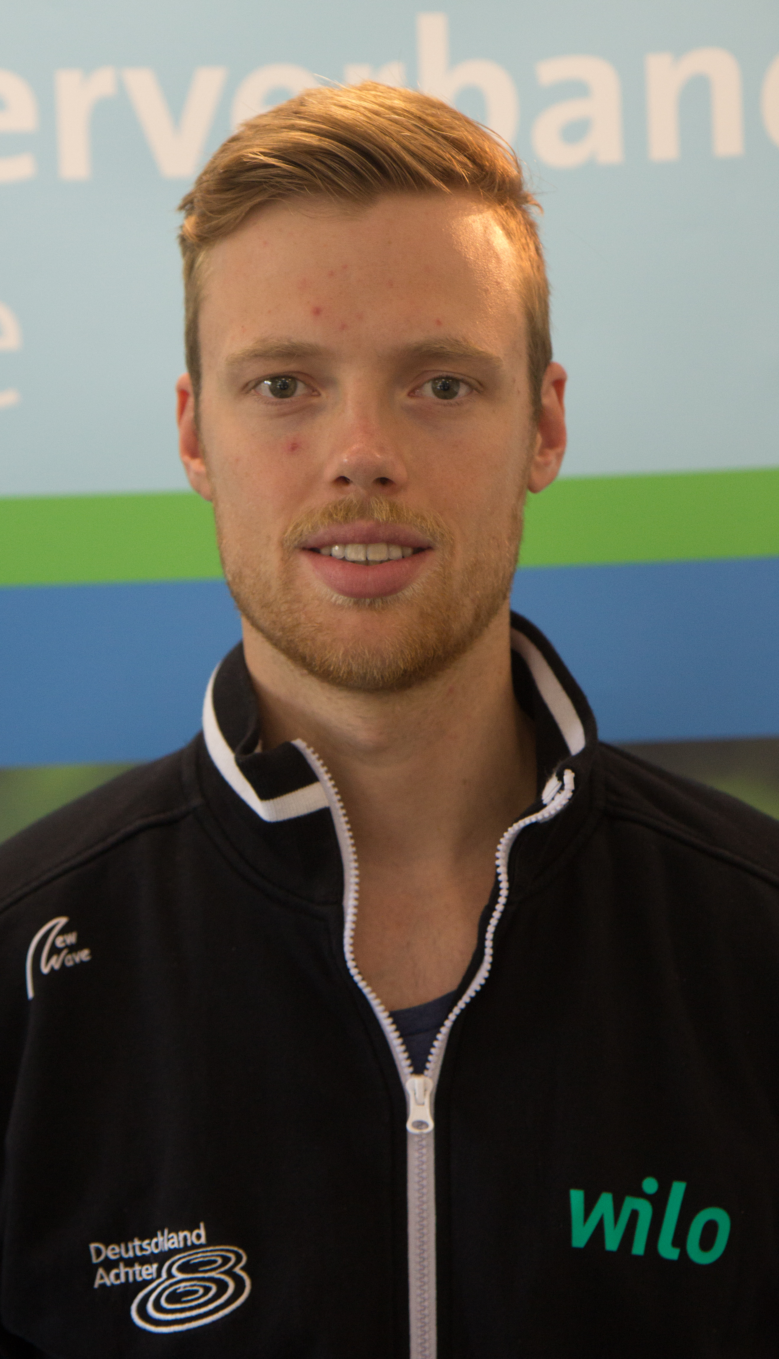 Medientag des Ruderverbandes in der Ruderakademie Ratzeburg am 6. September 2017: Johannes Weißenfeld